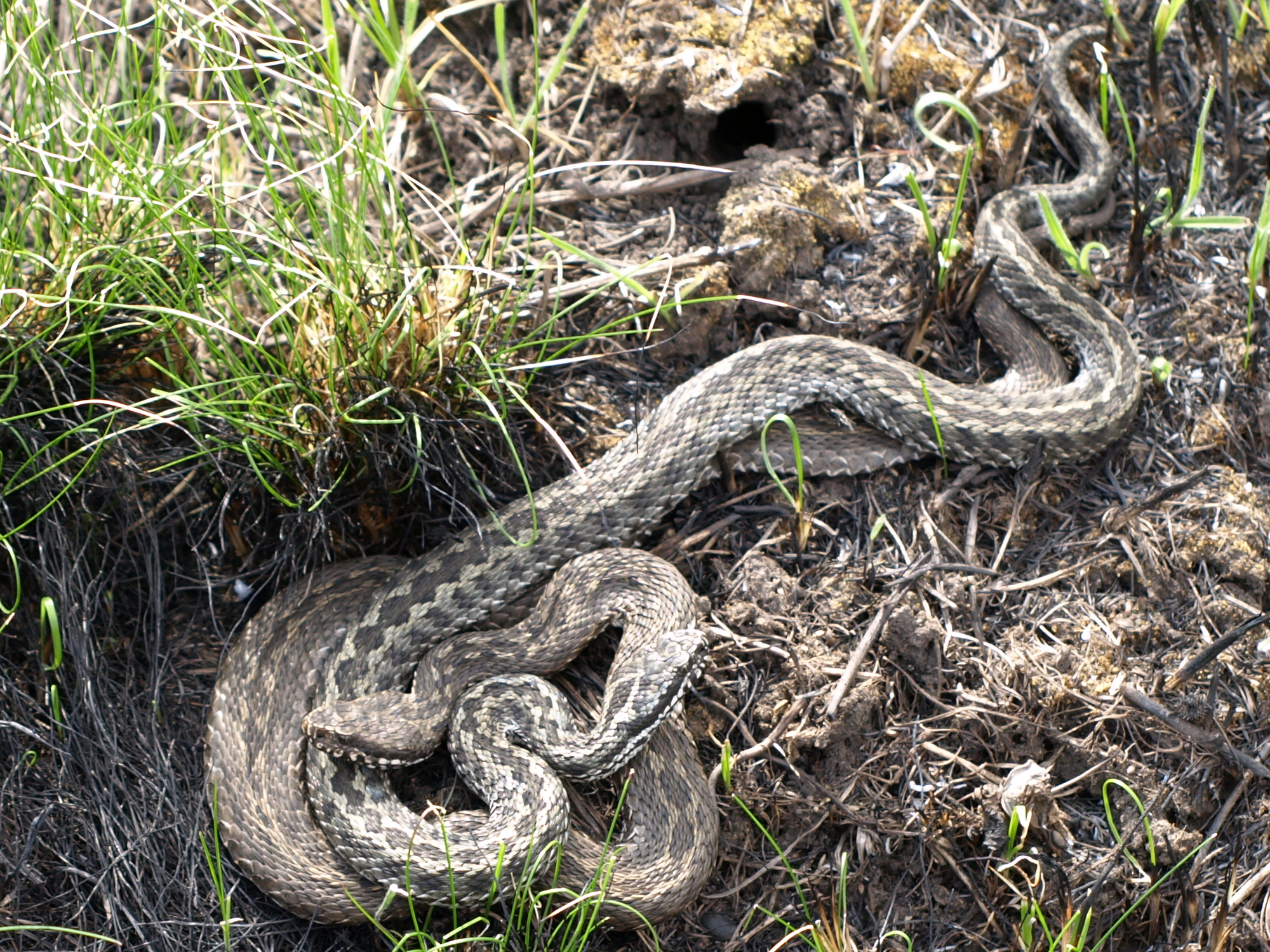 Спарювання степових гадюк